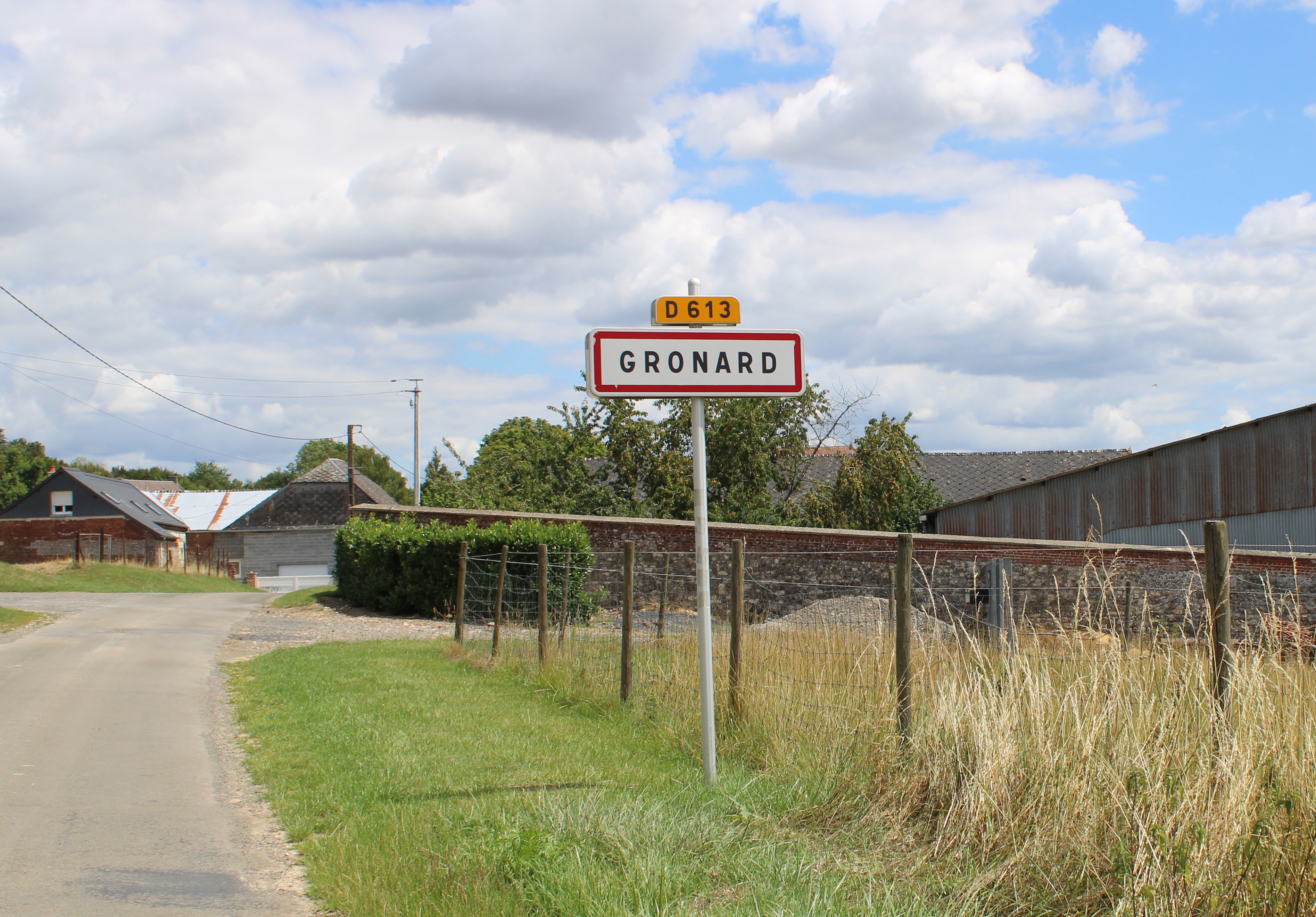 Entrée du village